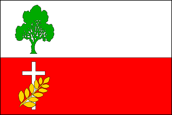 vlajka, Újezd, okres Žďár nad Sázavou